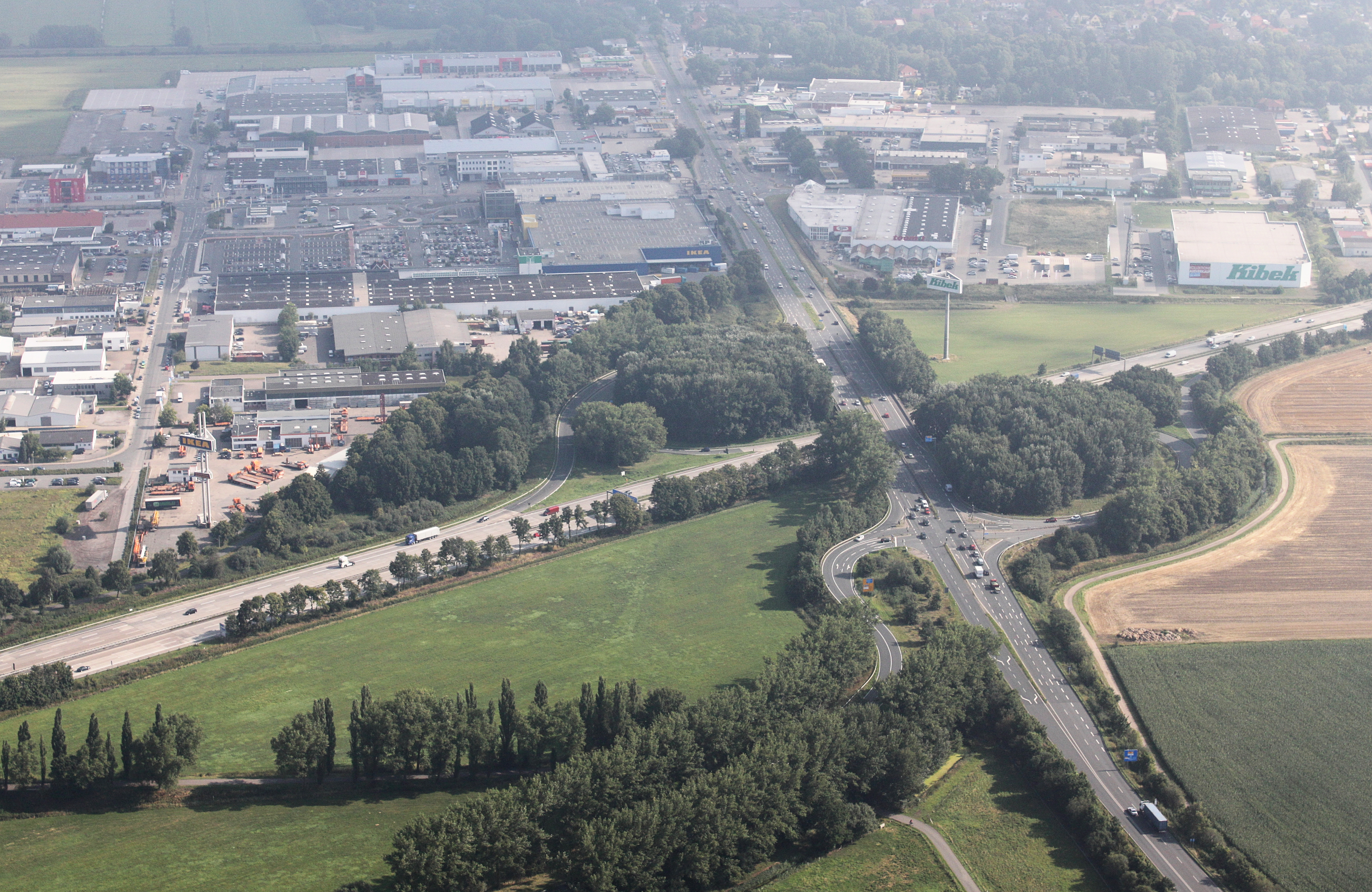 Luftaufnahme; entlang der A1 (auf der Südseite) von der Autobahnabfahrt Arsten bis zum Bremer Kreuz; Blickrichtung nach Norden